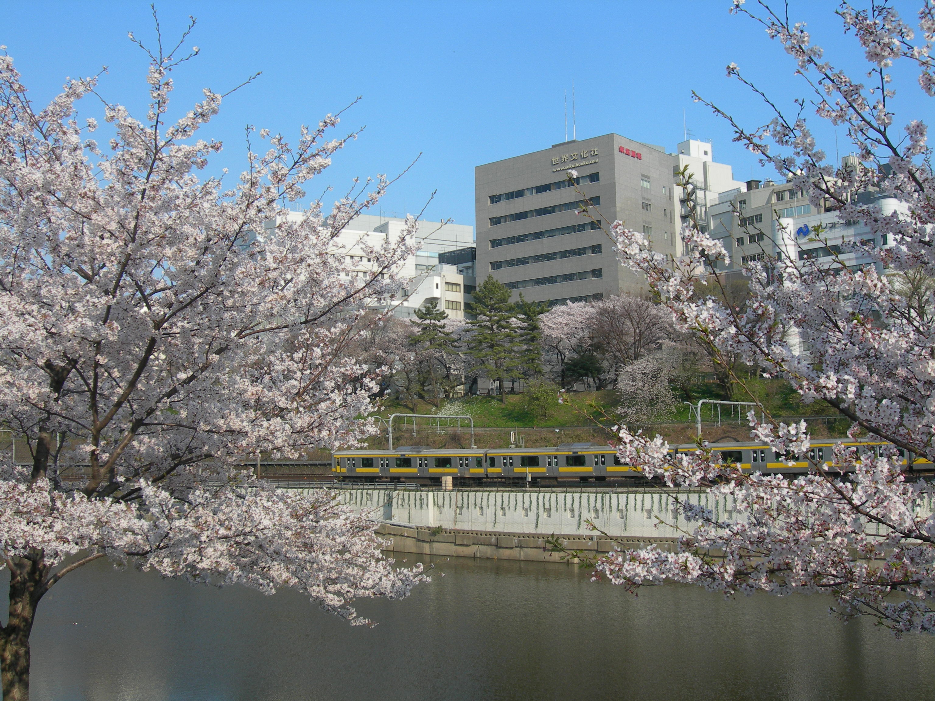 東京都千代田区九段北にある世界文化社の本社ビル